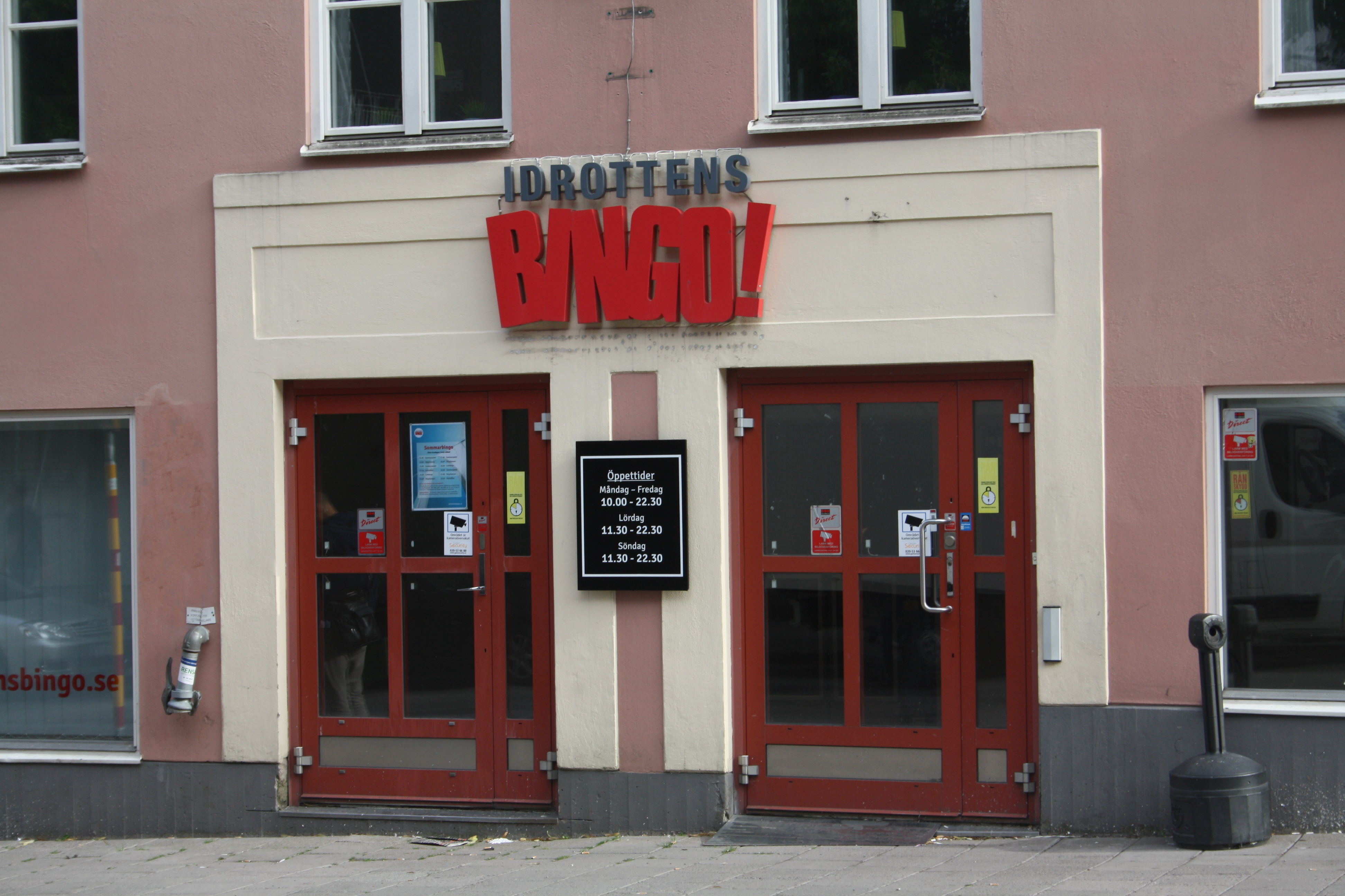 Idrottens Bingo - Stockholm - Södermalm